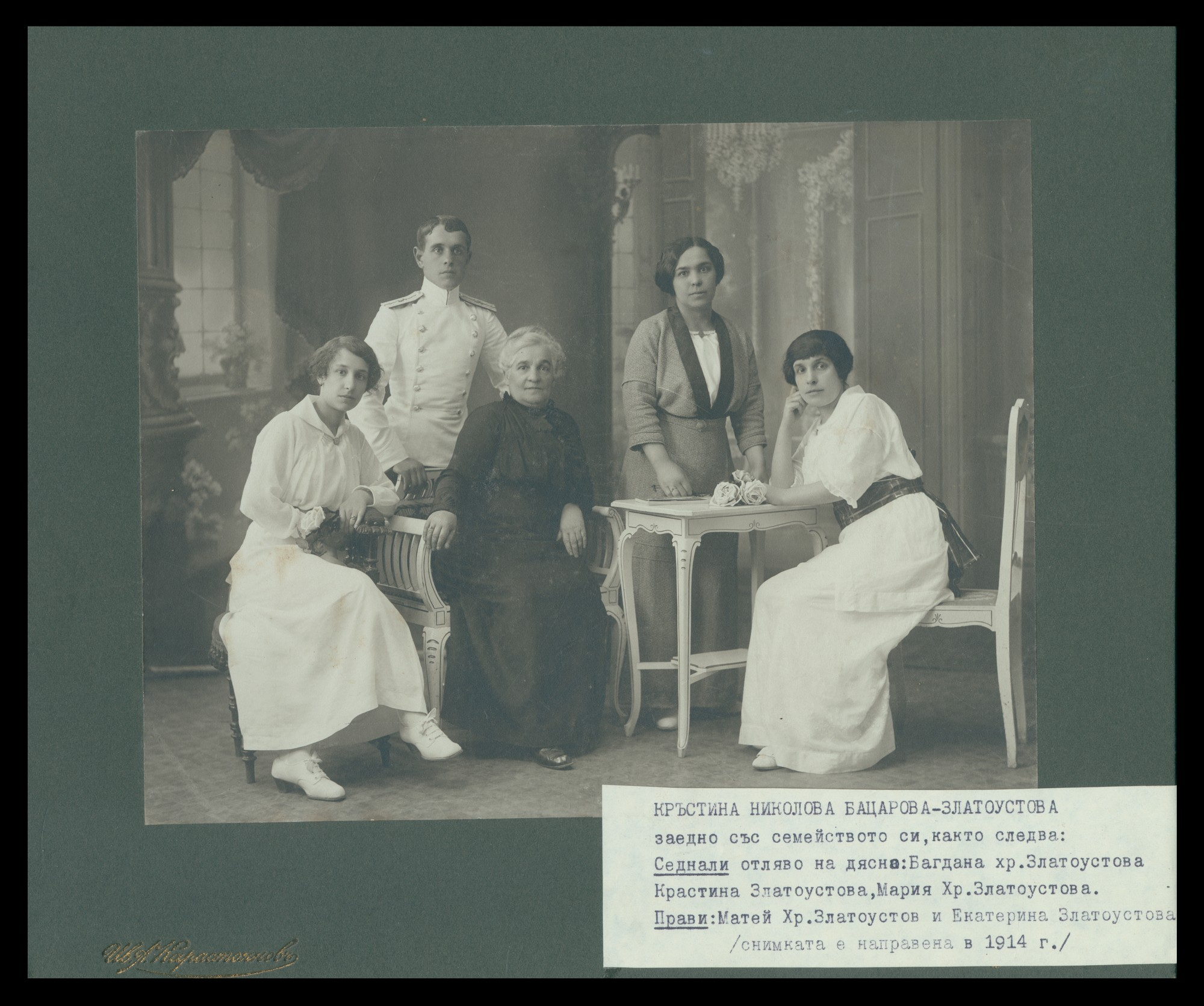 Екатерина Златоустова със семейството си. В средата Кръстина Базарова-Златоустова, от ляво на нея Багдана Златоустова, от дясно на нея Мария Златоустова. Изправени Матей Златоустов и Екатерина Златоустова